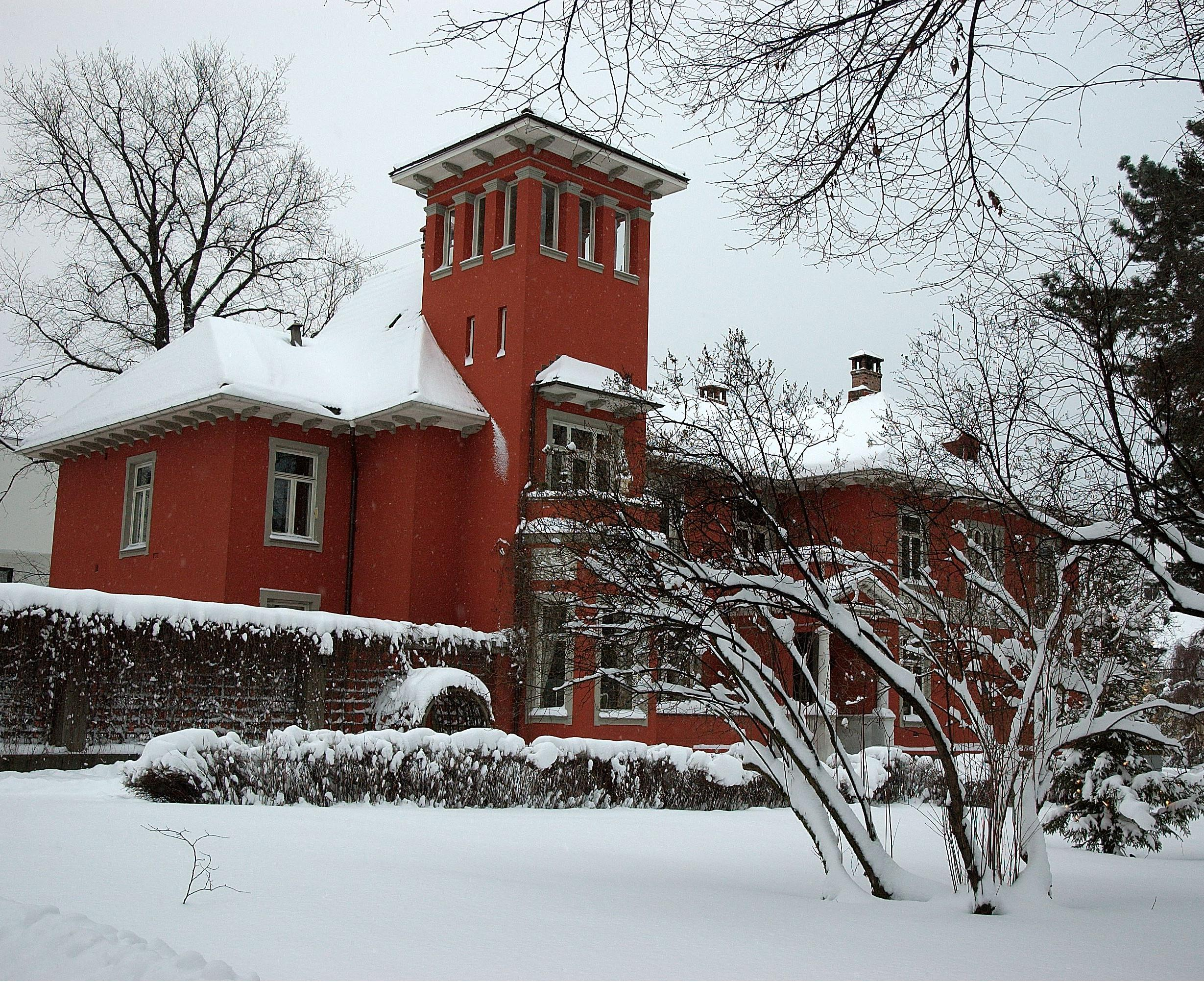 Aschehougvillaen, Drammensveien 99 i Oslo.